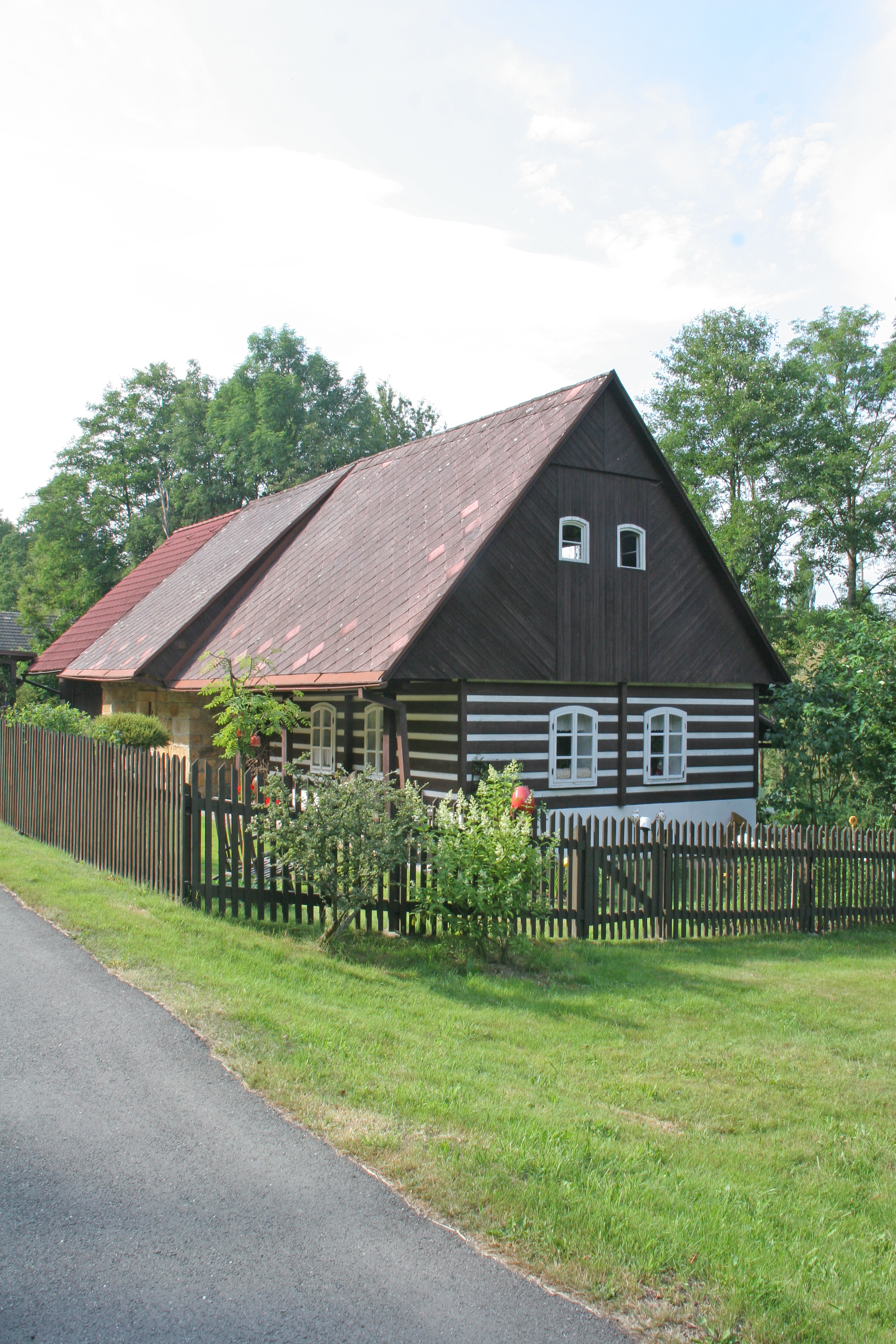 Brodek čp. 35